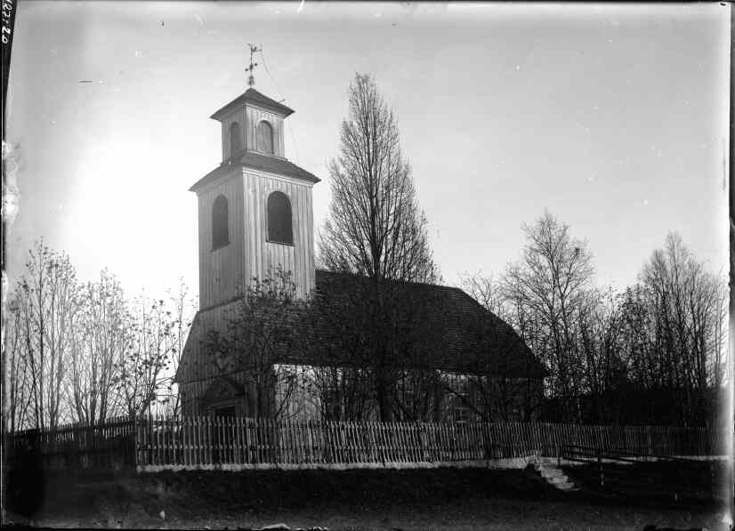 Kyrkan från sydväst. Kategori: (01) ExteriörerKyrkan från sydväst.